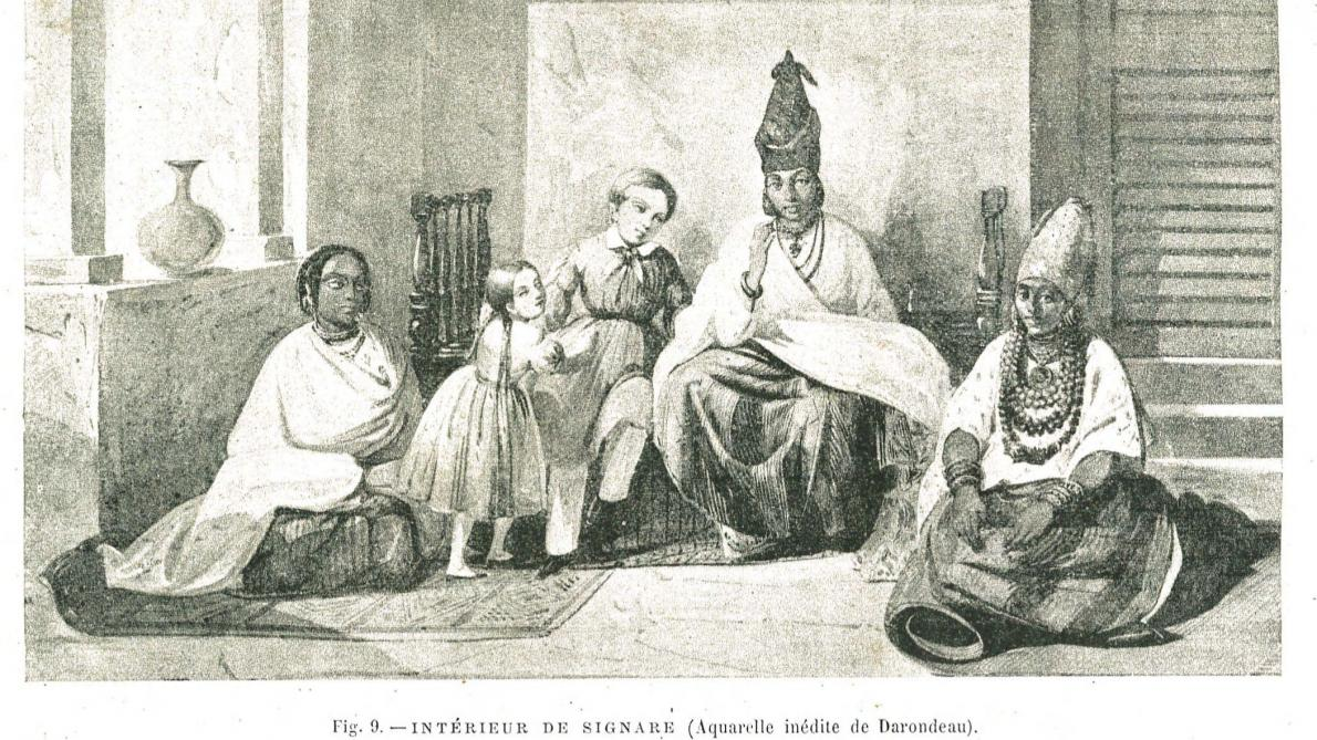 Femmes métisse du Sénégal. Intérieur de Signare (illustration de Côte occidentale d'Afrique du colonel Frey - fig. 9 p. 16)